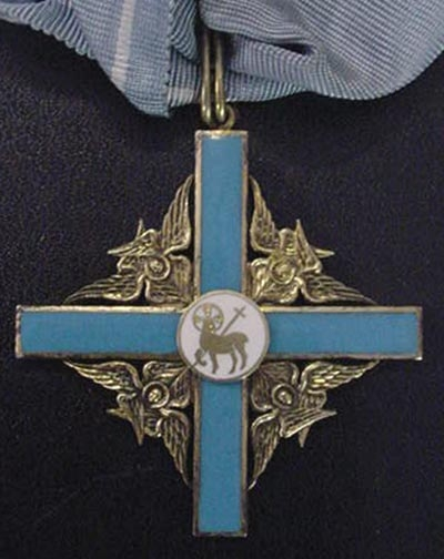 Fiński order Baranka Bożego, kolekcja Radeborn, Malmö, foto Alexvonf 2003